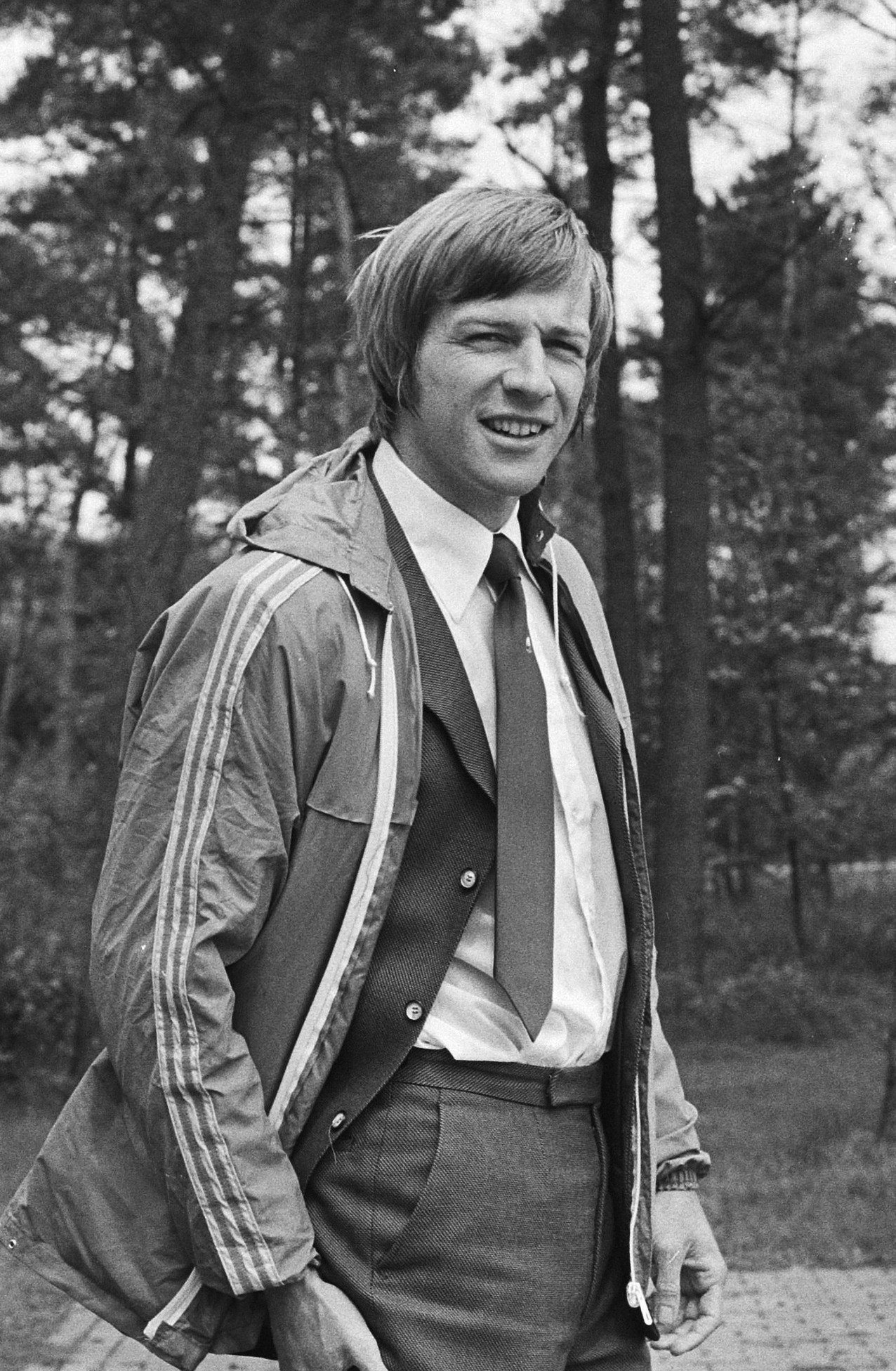 Nederlandse kampioenschappen tienkamp op Papendal; geblesseerde Eltjo Schutter